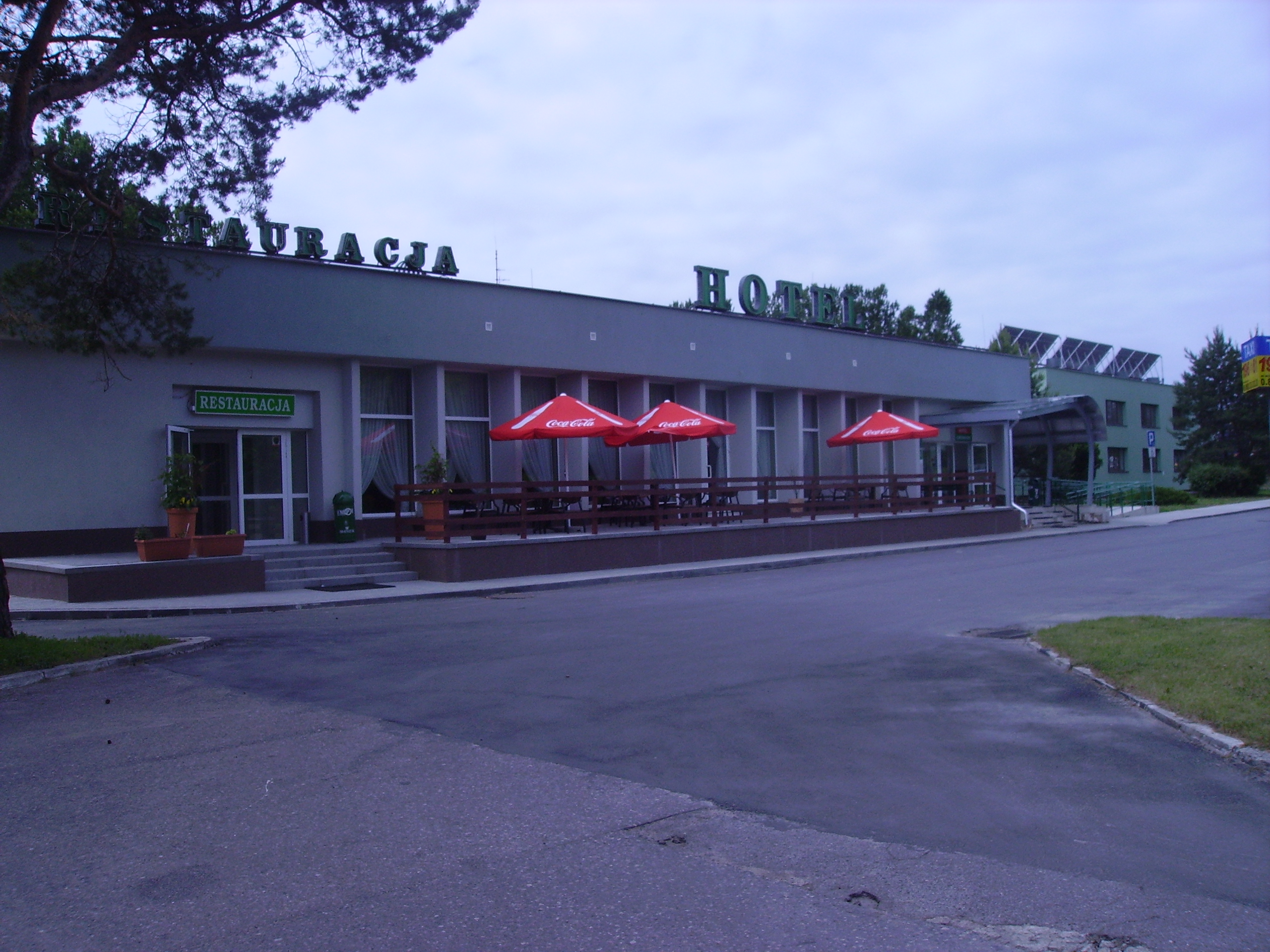 Hotel Gromada w Białymstoku ul. Jana Pawła II